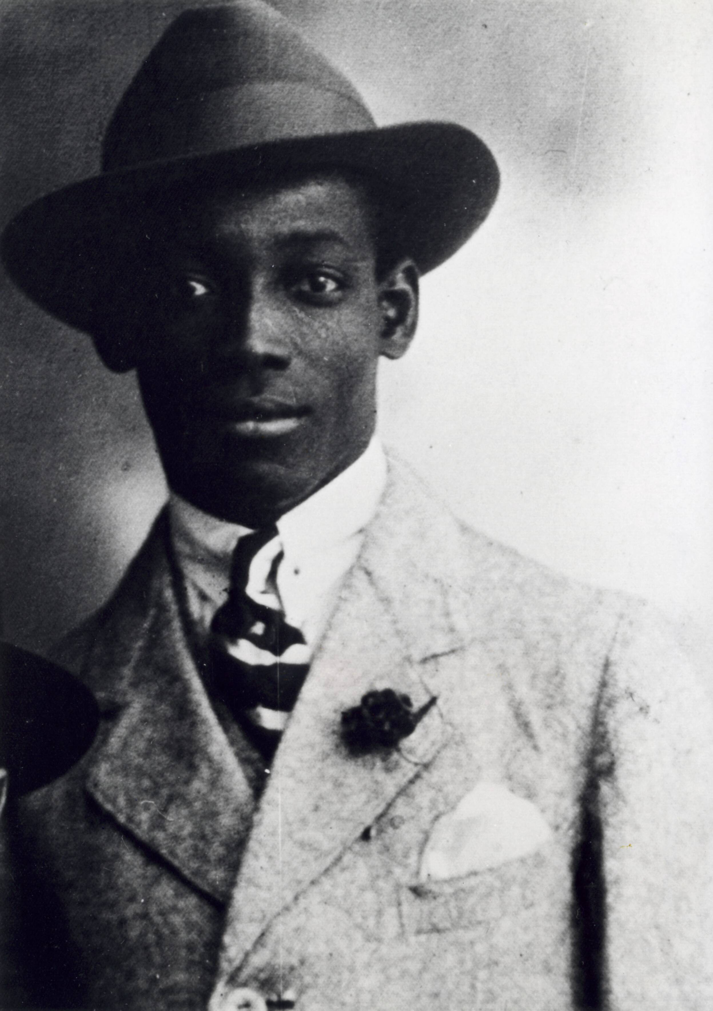 De Surinaamse schrijver en verzetsstrijder Anton de Kom (Suriname 1898 - Duitsland 1945). Plaats en datum van de foto onbekend.